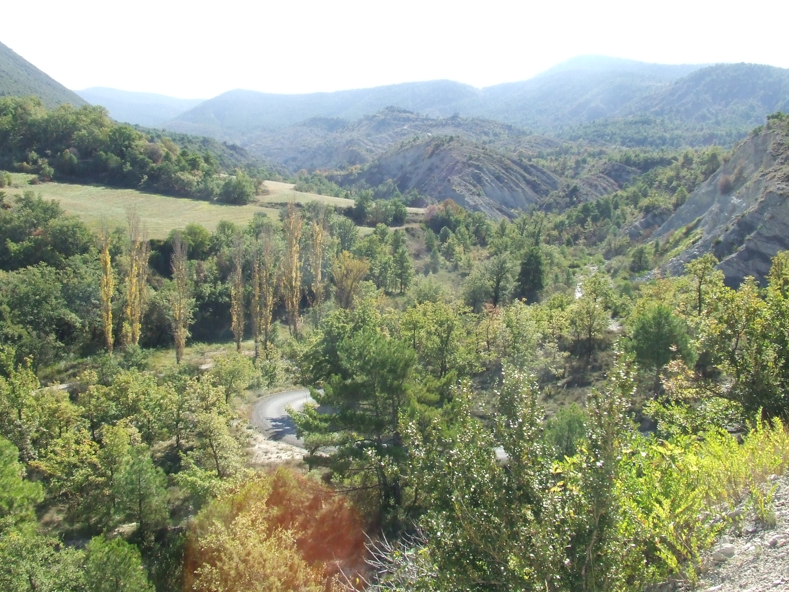 Barranc de la Podega, part alta (Orcau, Isona i Conca Dellà, Pallars Jussà)